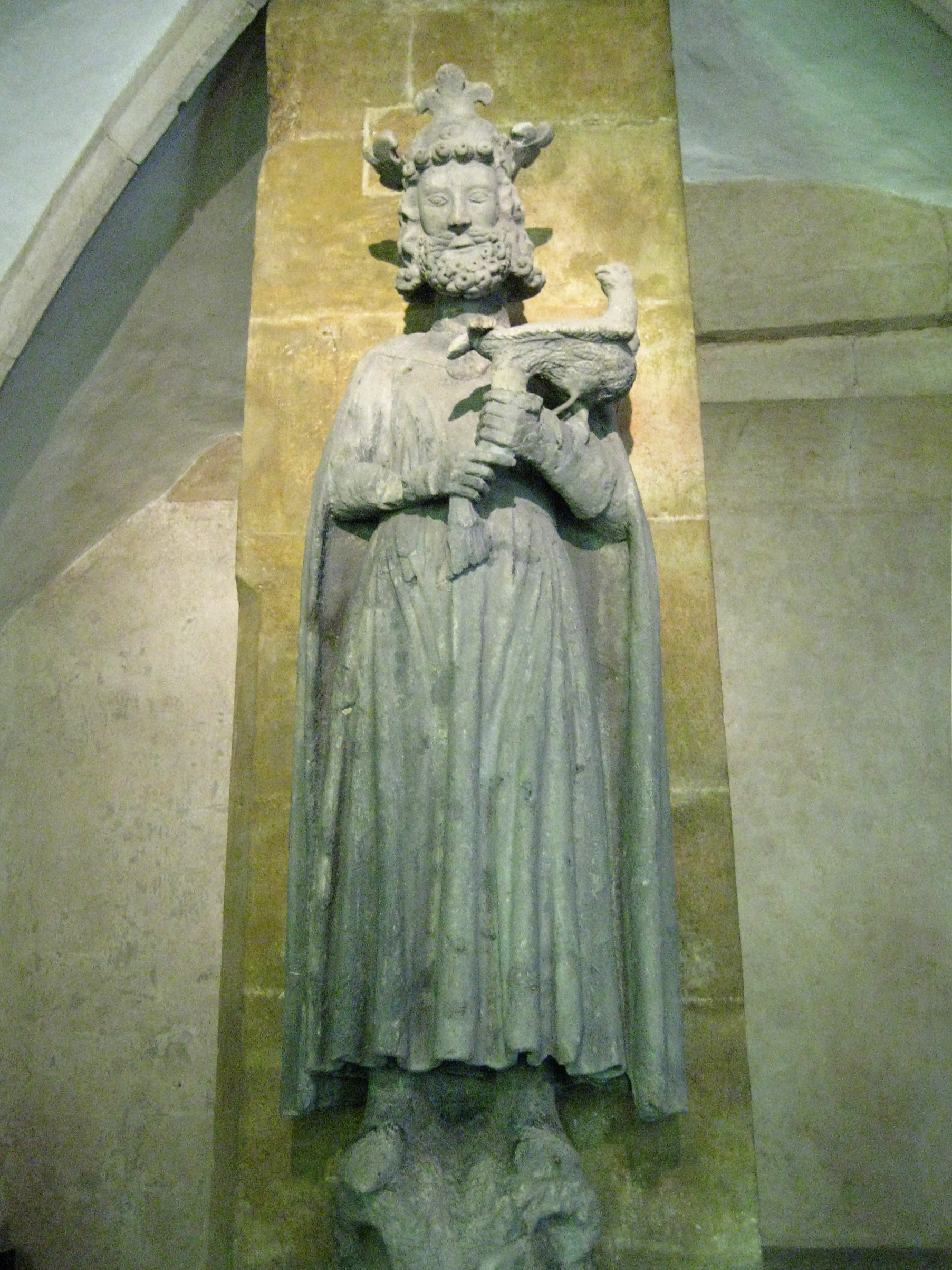 Statue des Kaisers Friedrich II. vom Schwarzen Turm der Steinernen Brücke (Regensburg, um 1280/90) im Historischen Museum in Regensburg.